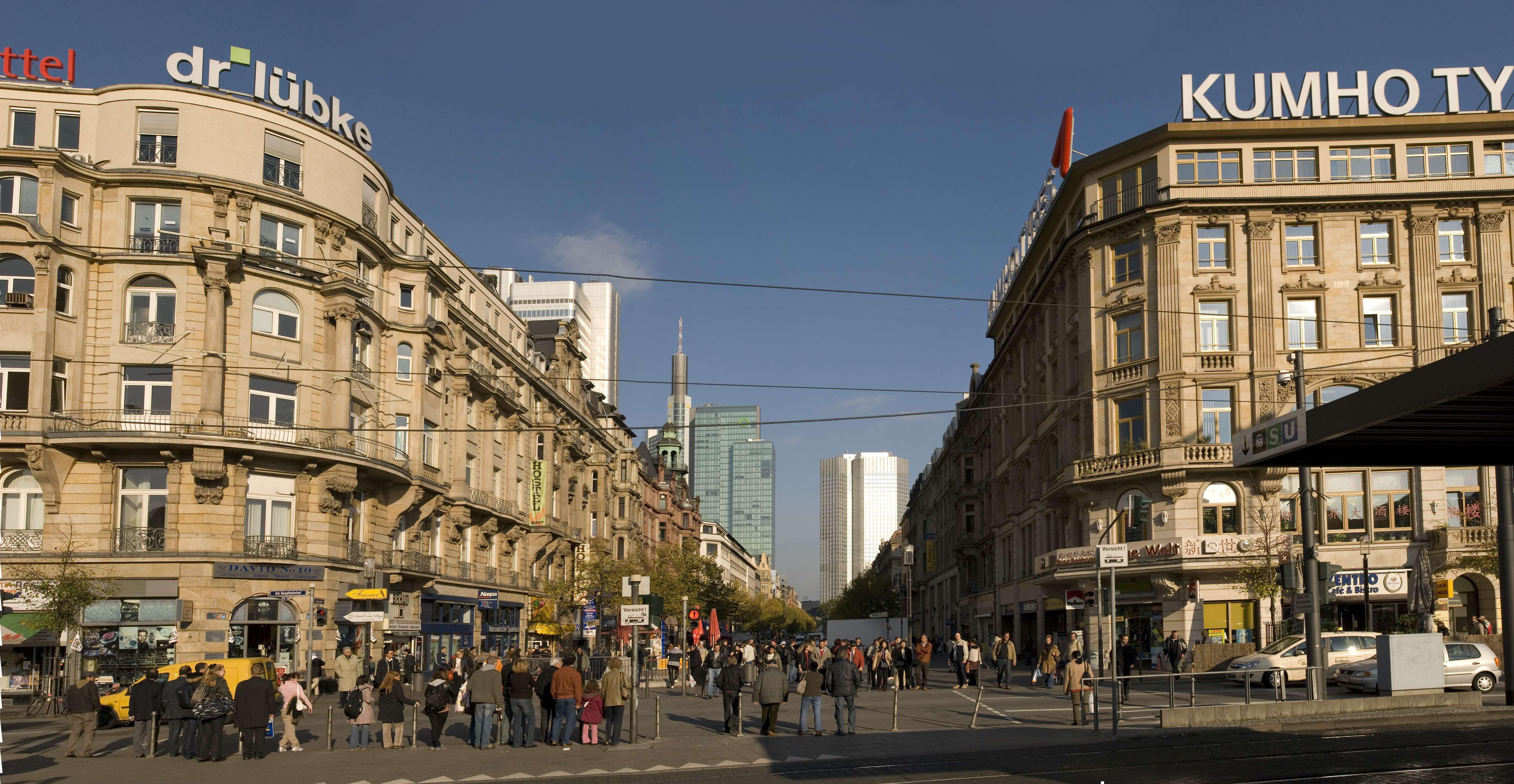 Kaiserstraße Frankfurt, Kaisersack vom Bahnhofsvorplatz gesehen